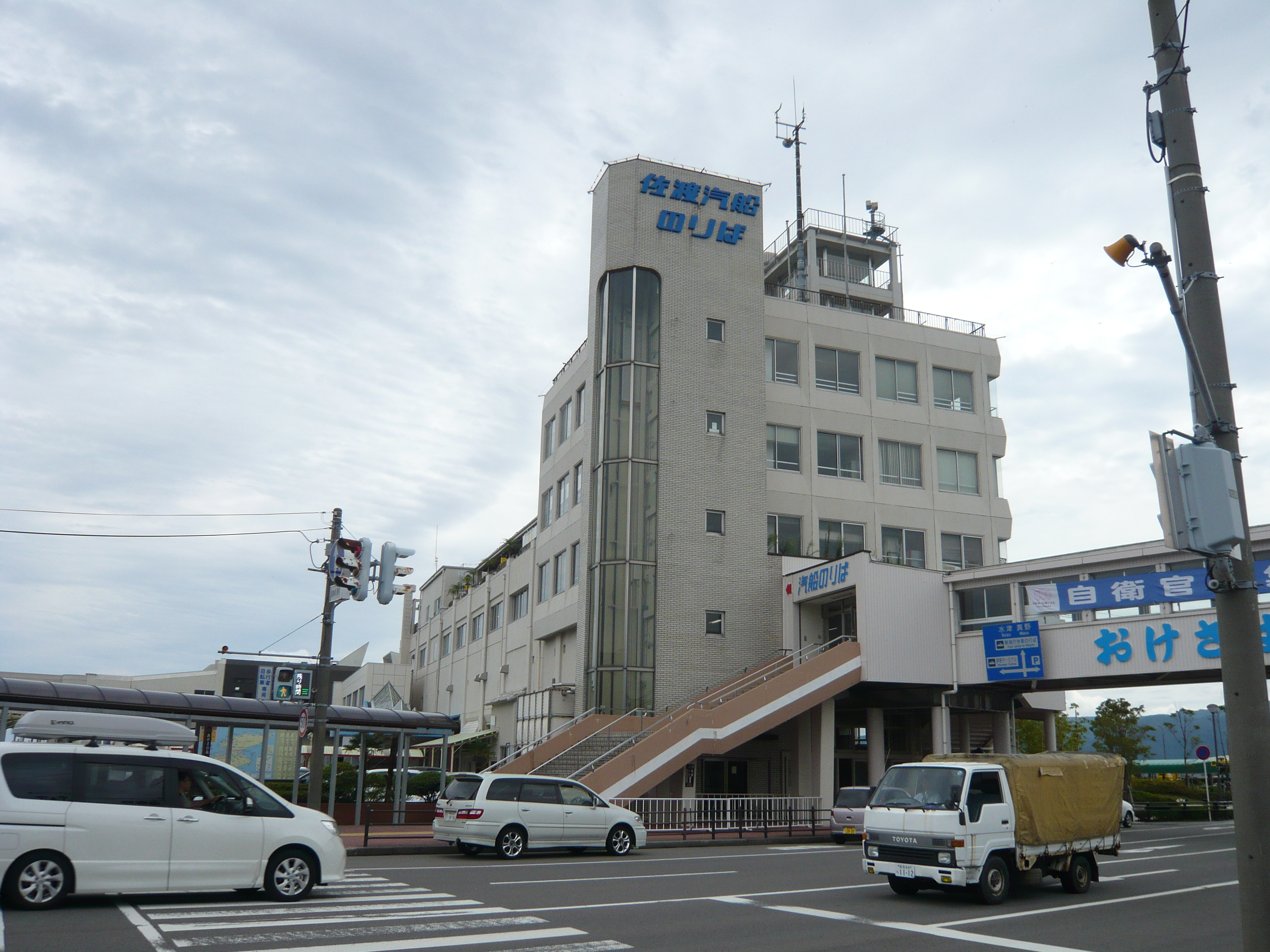 両津港ターミナルビル